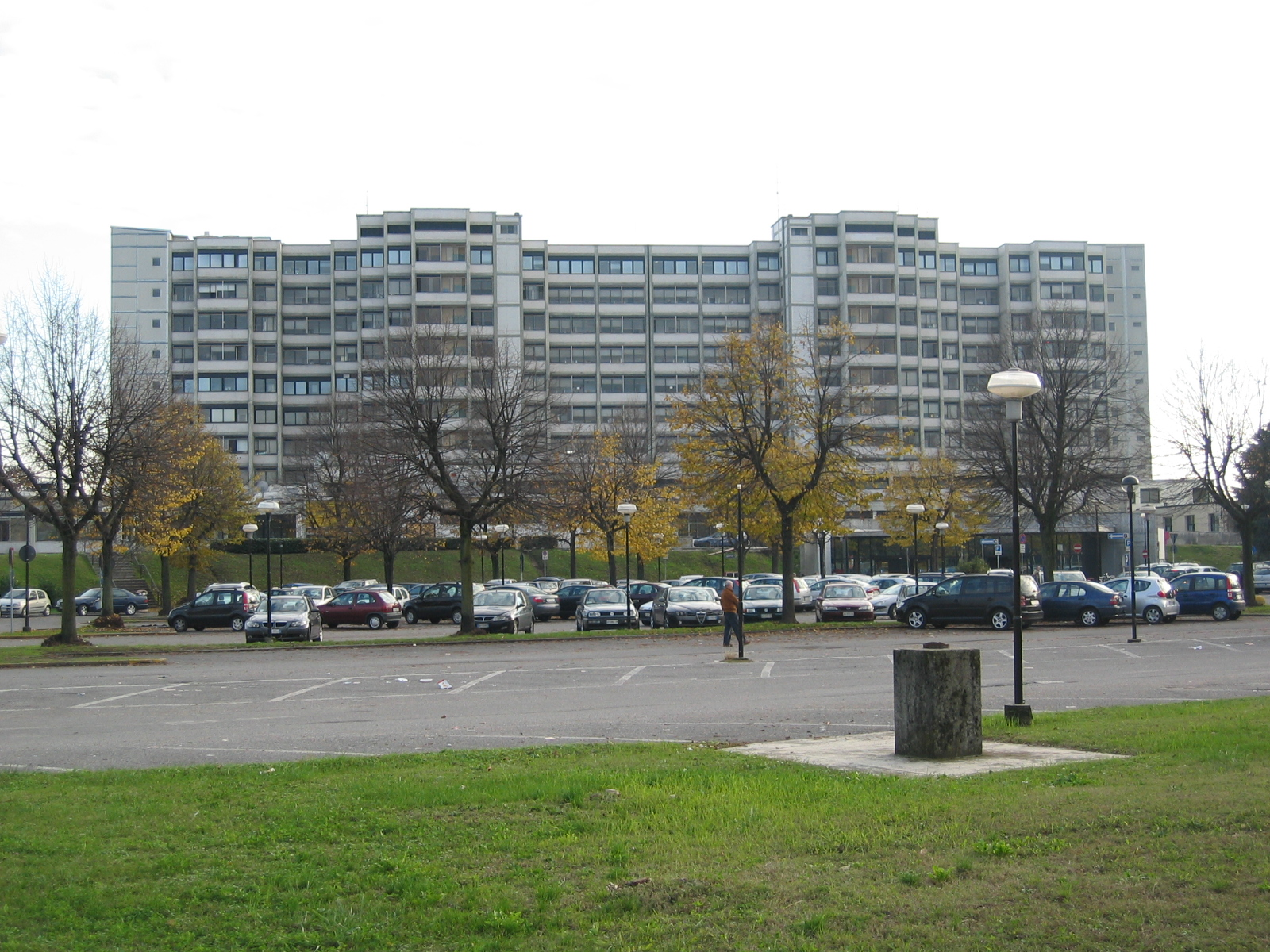 Il complesso dell'ospedale di Treviglio